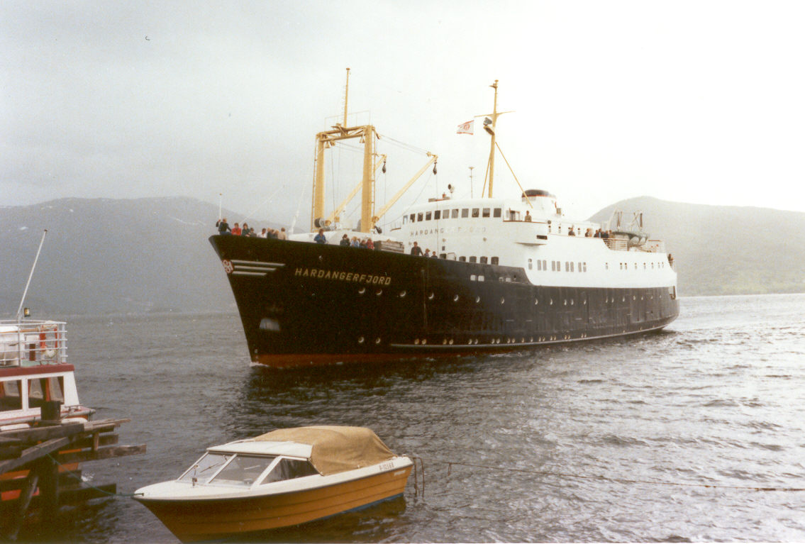 MS Hardangerfjord, built 1959.